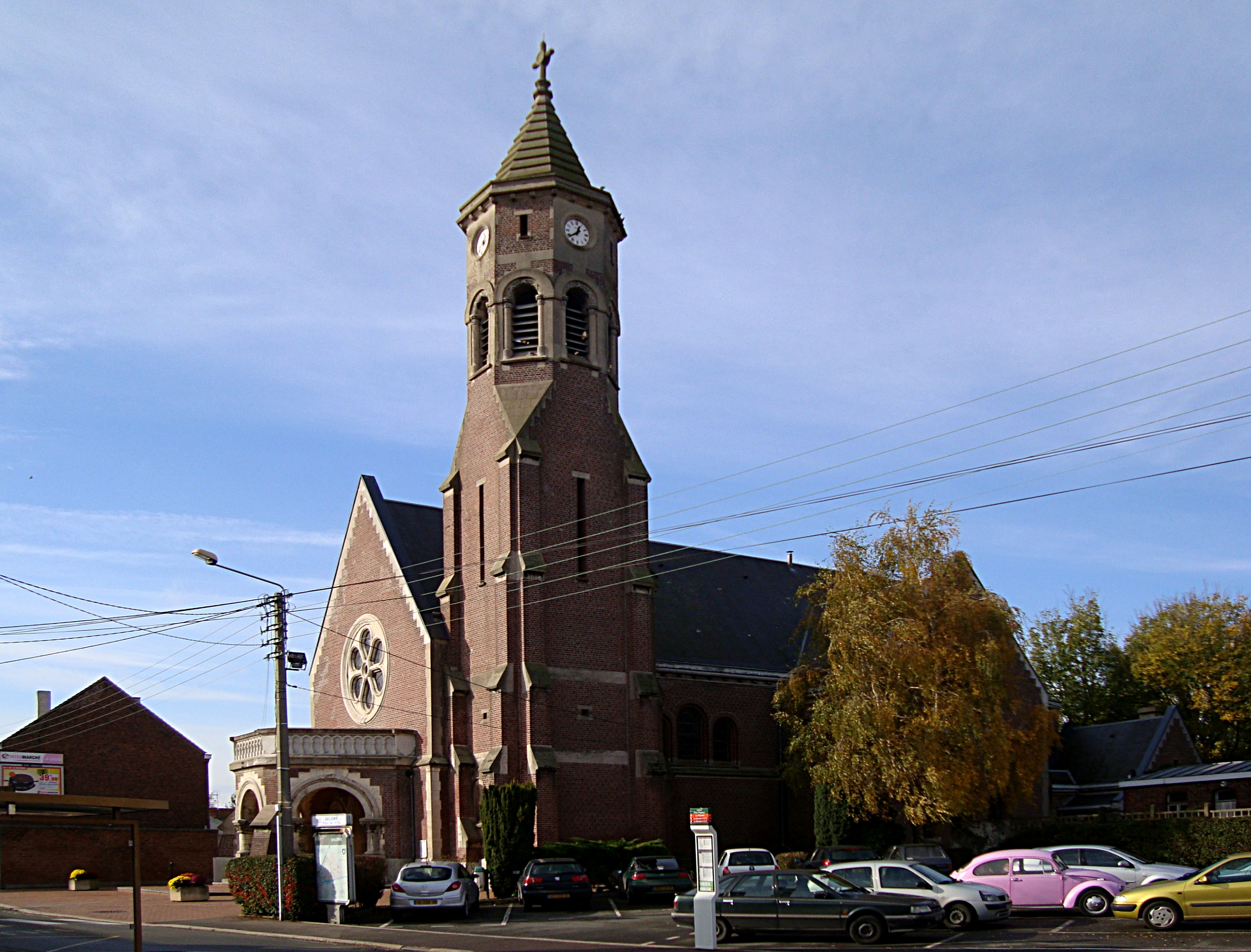 L'église Saint-Vaast de Salomé (Nord). Détruite pendant la première guerre mondiale, l'église est reconstruite dans les années 1920 pour être réouverte en 1928. De nouveau endommagée par les bombardements de mai 1940, elle est restaurée après guerre et inaugurée en octobre 1949.